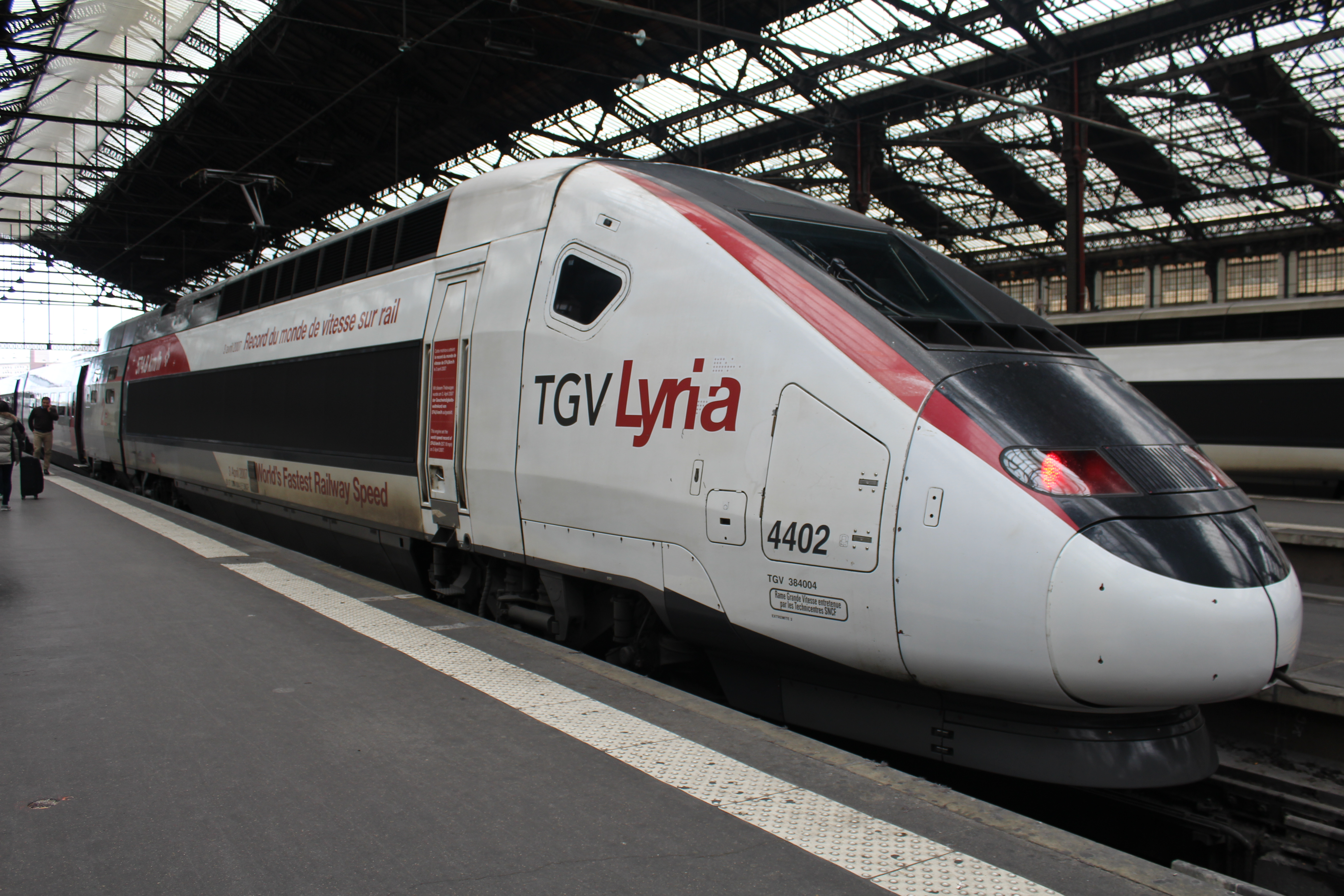 TGV Lyria dans le hall 1 de la gare de Lyon à Paris.